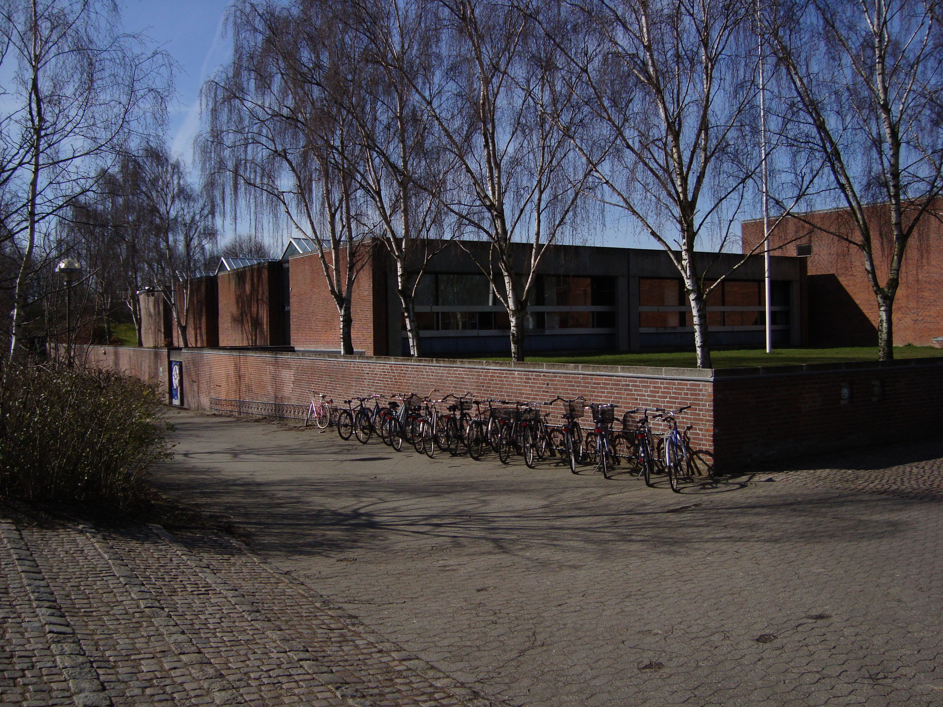 Risskov Gymnasium i Århus